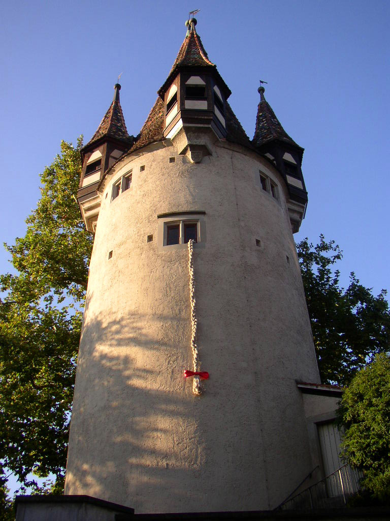 Lindau Diebsturm